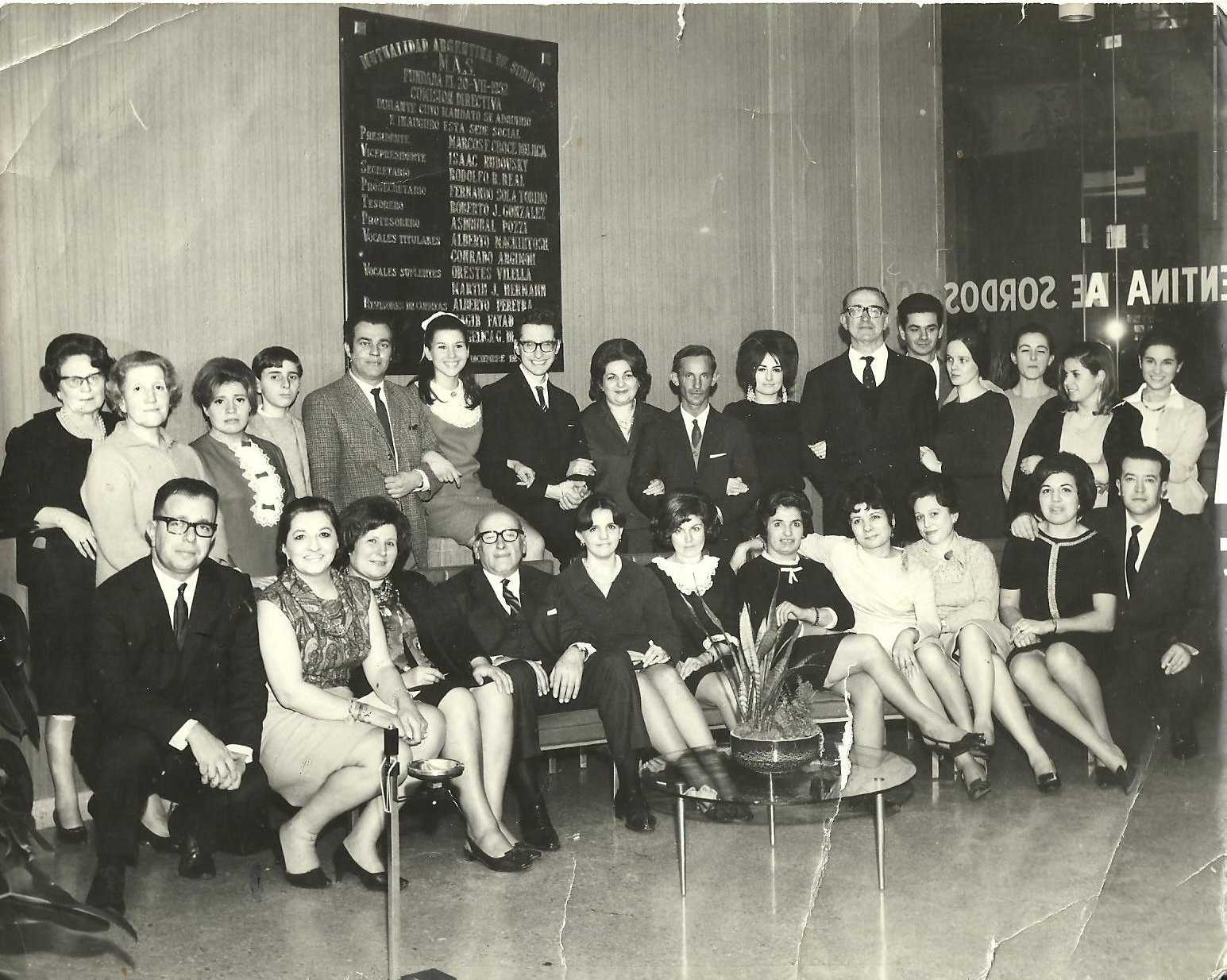 Staff de la MAS en los años 60.